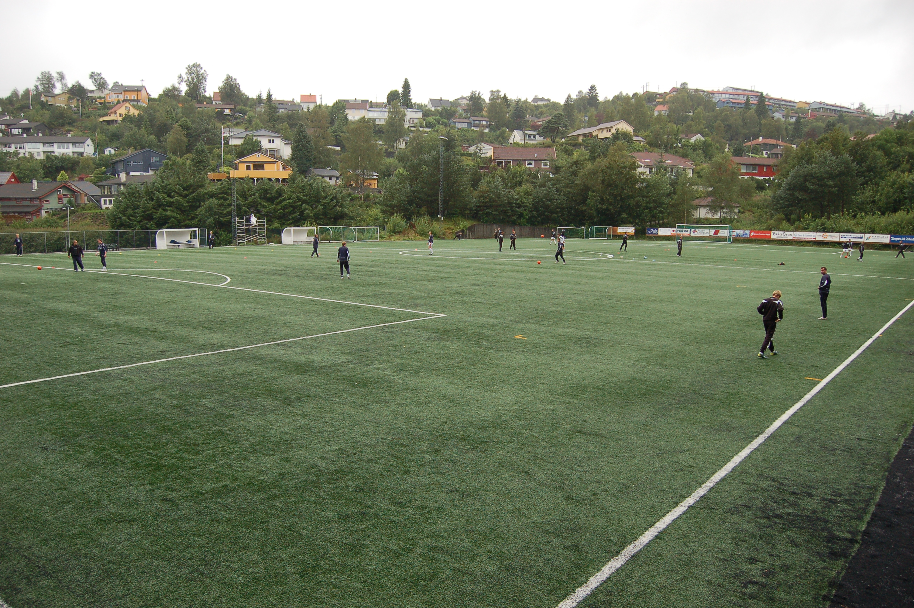 Kleppestø kunstgress, the arena of Askøy Fotballklubb